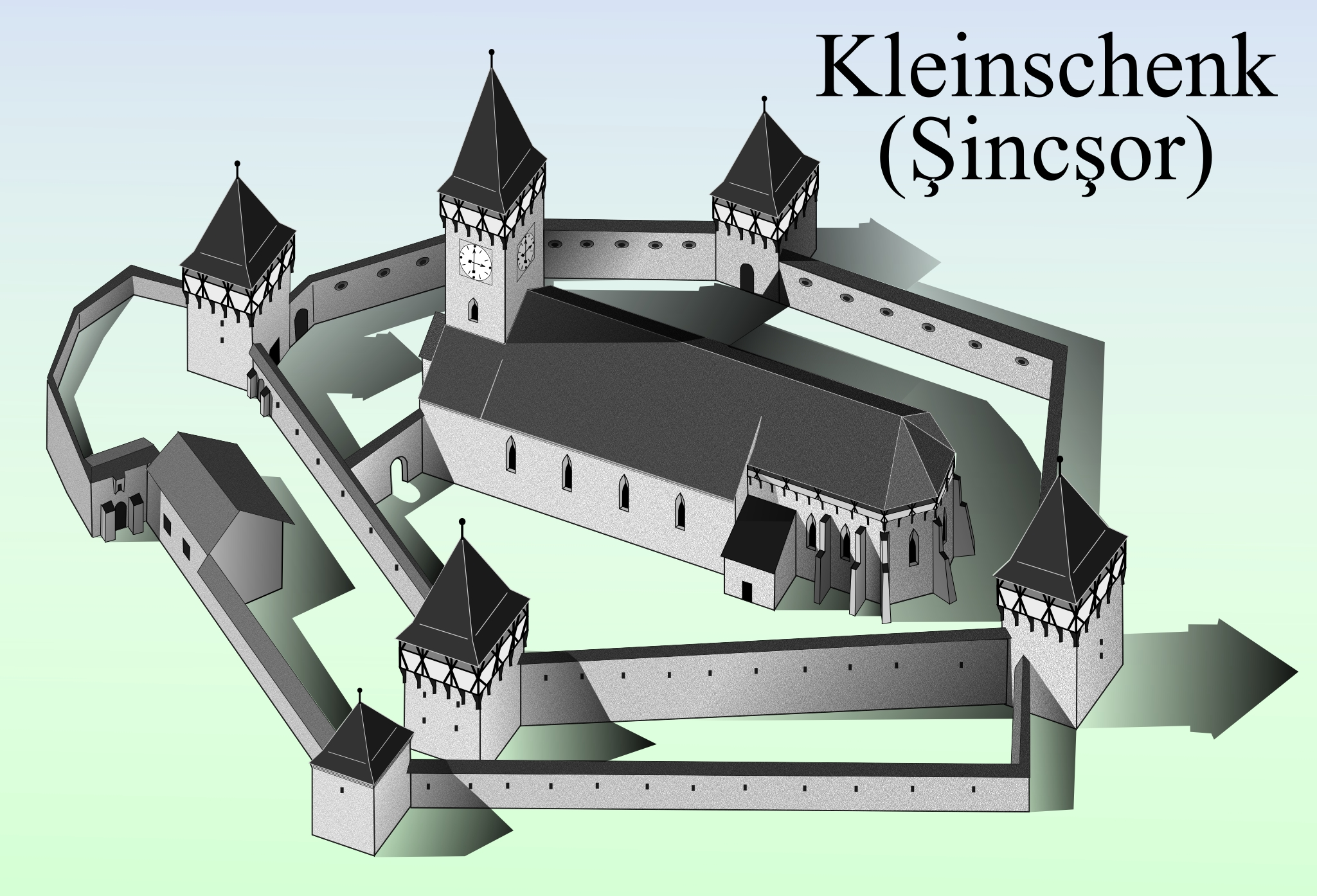 Biserica fortificata din Cincsor, Brasov.